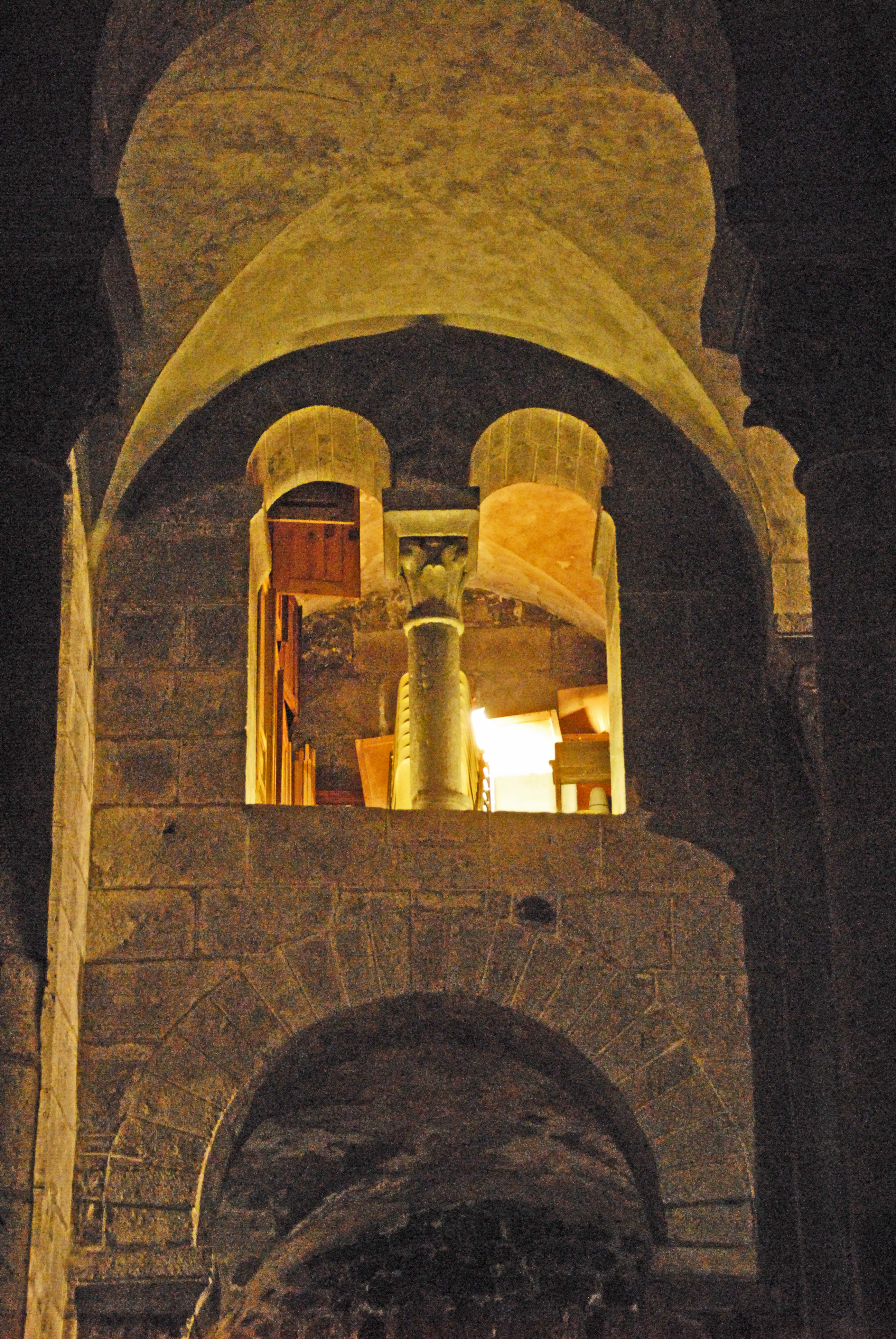 N.-D. d'Orcival, Narthexwand im nöredl. Seitenschiff